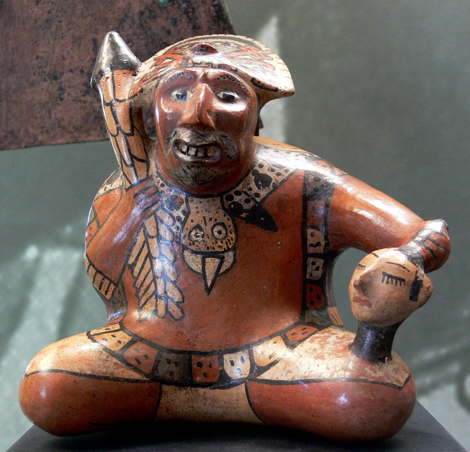 Schaffhausen, Museum zu Allerheiligen, Sammlung Ebnöther, (Abteilung "Krieger/Waffen") Krieger mit Trophäenkopf, Ton-Gefäss (Höhe: 15 cm), Peru, südliche Küstenregion, Nazca, 200 v. Chr.–600 n. Chr. (Katalog 1999, S. 196)